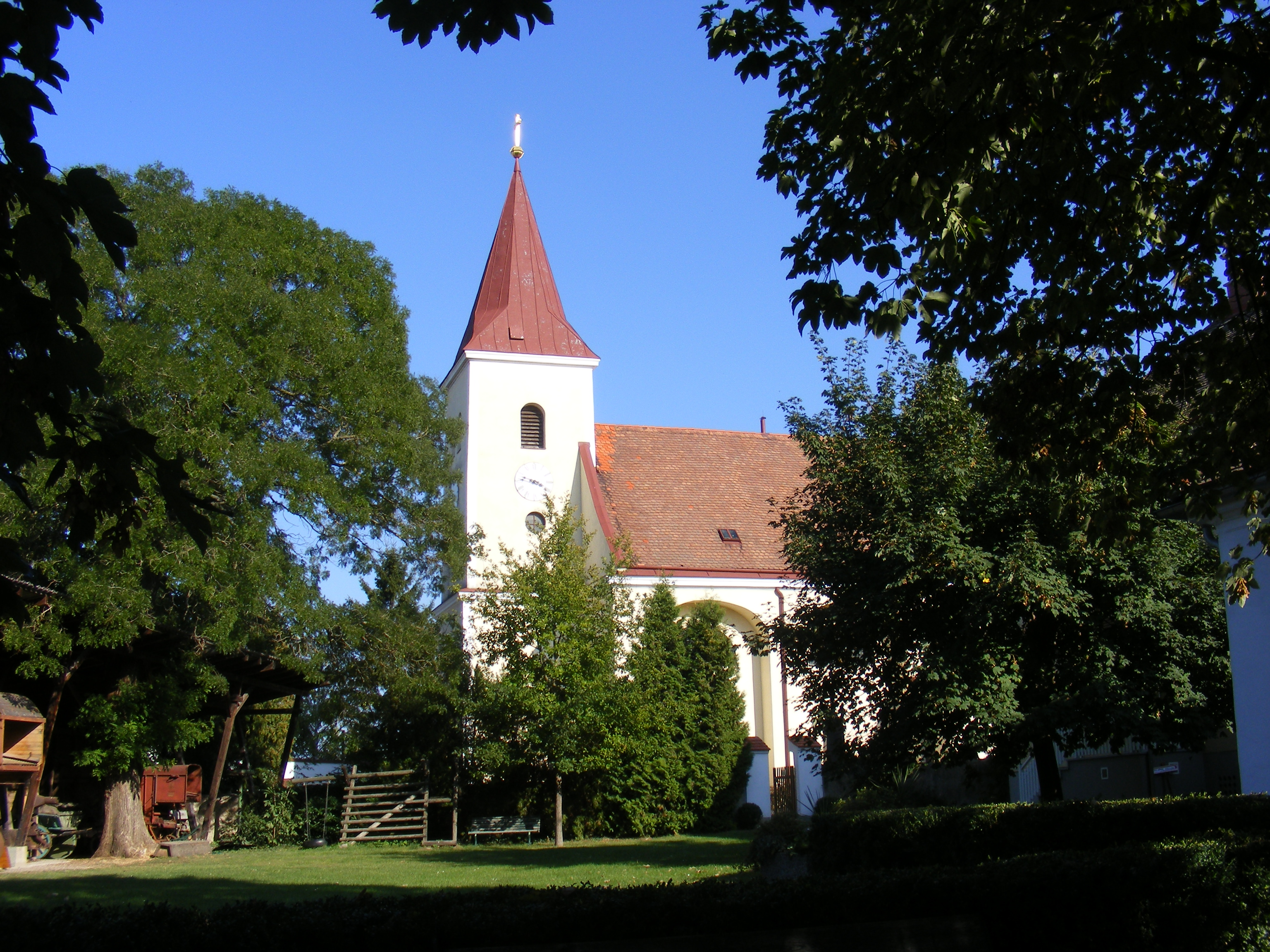 Kath. Pfarrkirche hl. Markus Prinzendorf